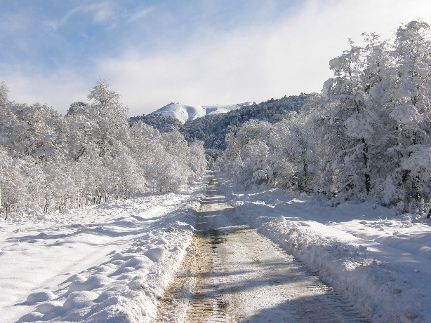 Malalcahuello, Chile, con vista hacia el Volcán Lonquimay en invierno de 2011. Fotografía por Leonardo Araya.